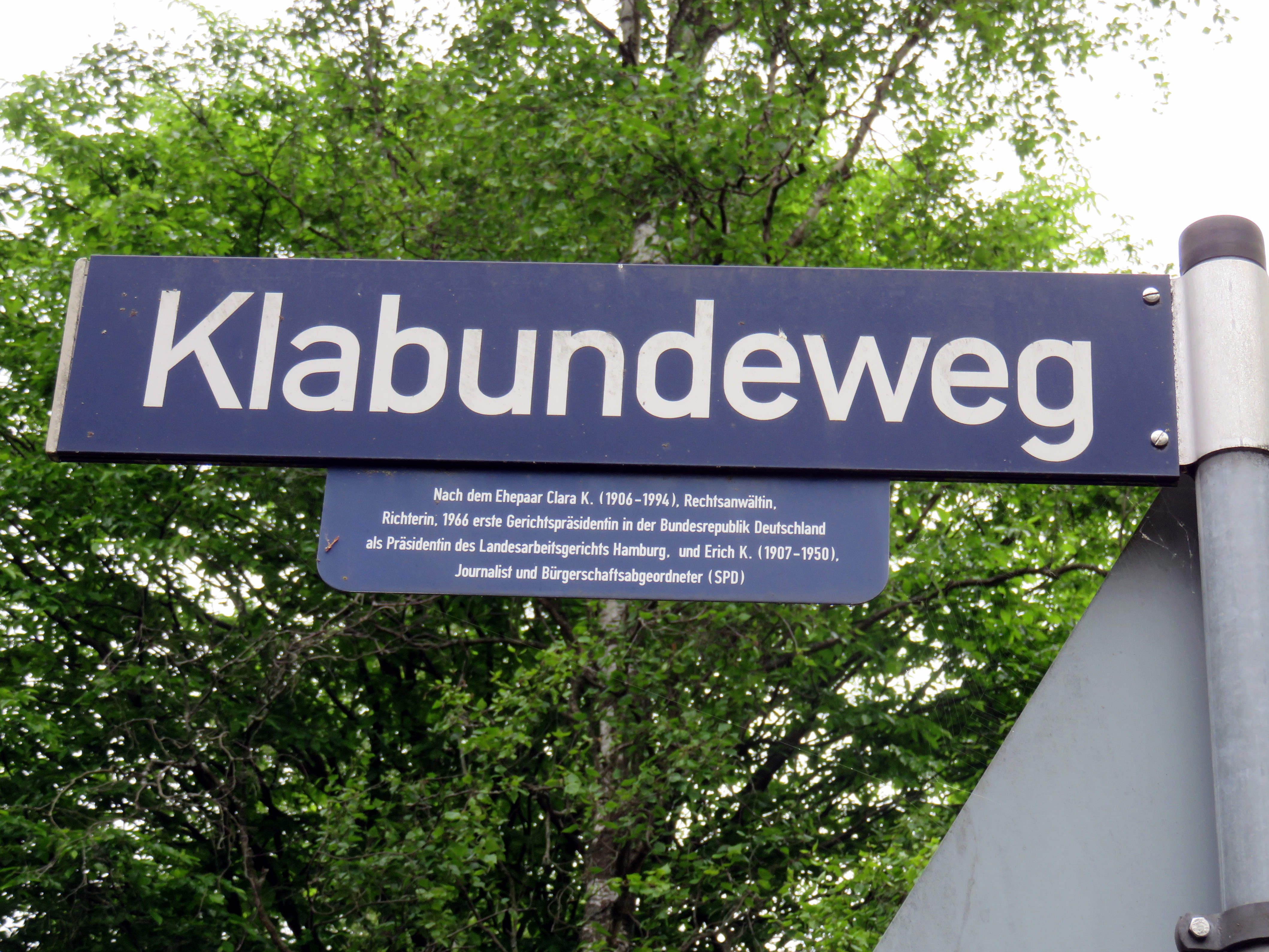 Straßenschild Klabundeweg in Hamburg-Bergstedt mit erläuterndem Zusatzschild zum Ehepaar Erich und Clara Klabunde.